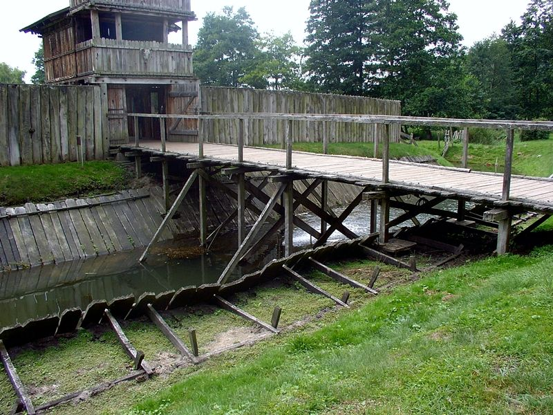 Eingangsbereich